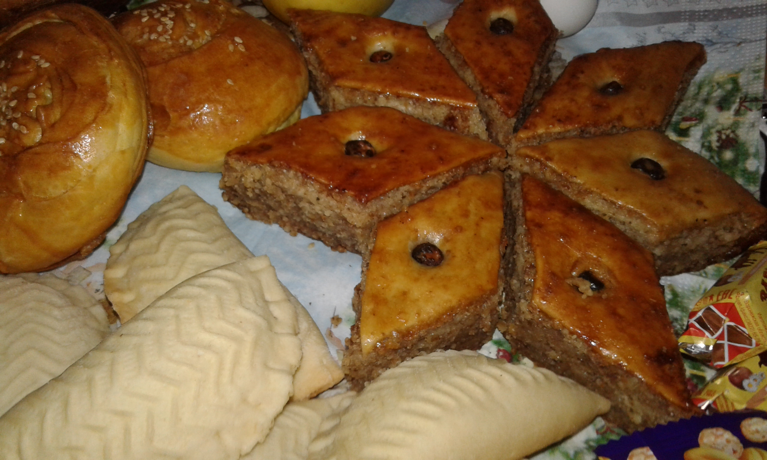 Хонча на Навруз